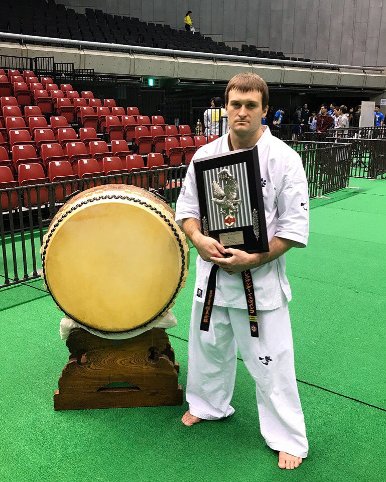 Ieromenko Oleksandr